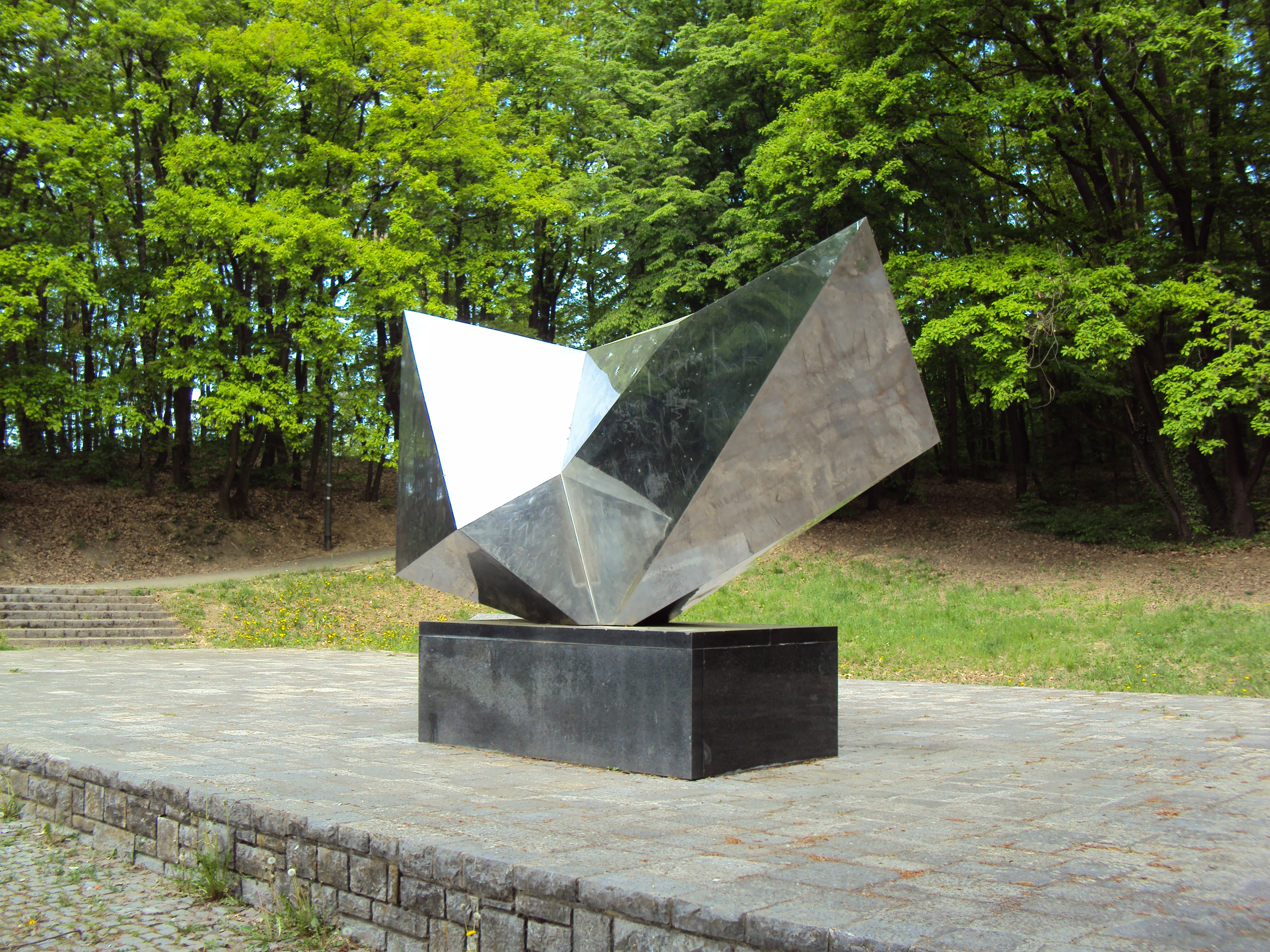 Spomenik žrtvama fašizma u Dotršćini, Zagreb, rad Vojina Bakića.